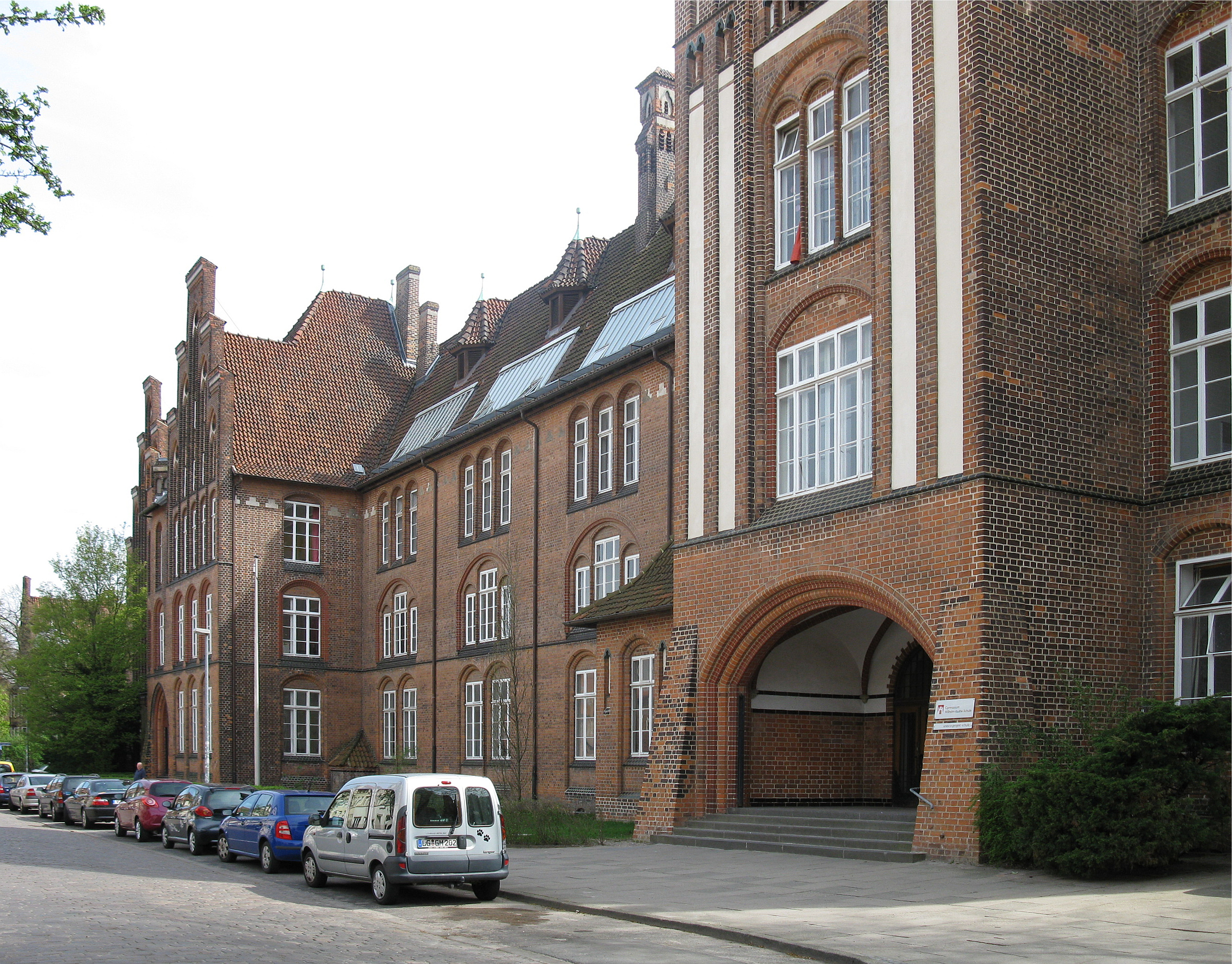 Wilhelm-Raabe-Schule (Gymnasium) in Lüneburg in Niedersachsen, Deutschland.